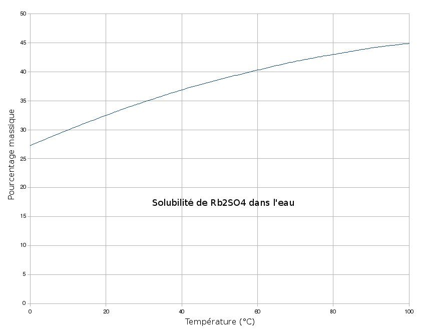 Solubilité de Rb2SO4 dans l'eau en fonction de la température.